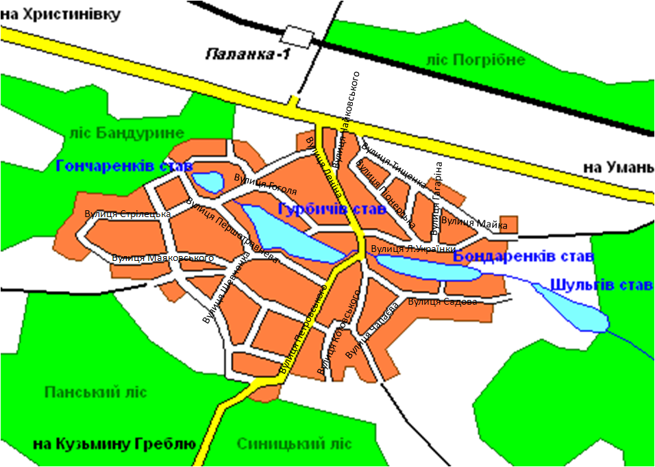 Село Паланка (Уманський район): Мапа села